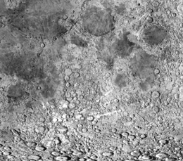 Catena Abulfeda